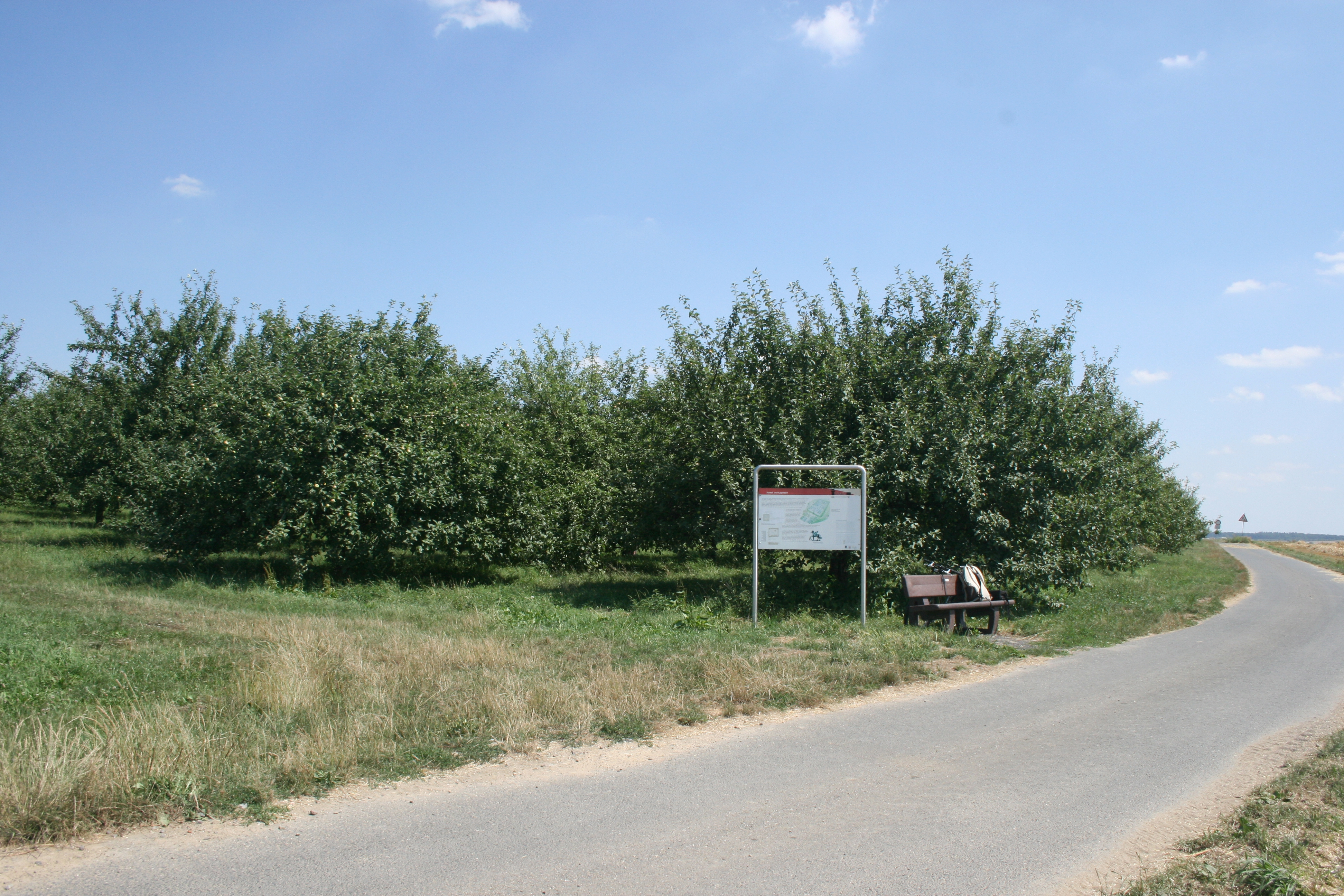 Kastell Langenhain, Ober-Mörlen, Wetteraukreis, Hessen. Ansicht des Kastellgeländes mit Schautafel.